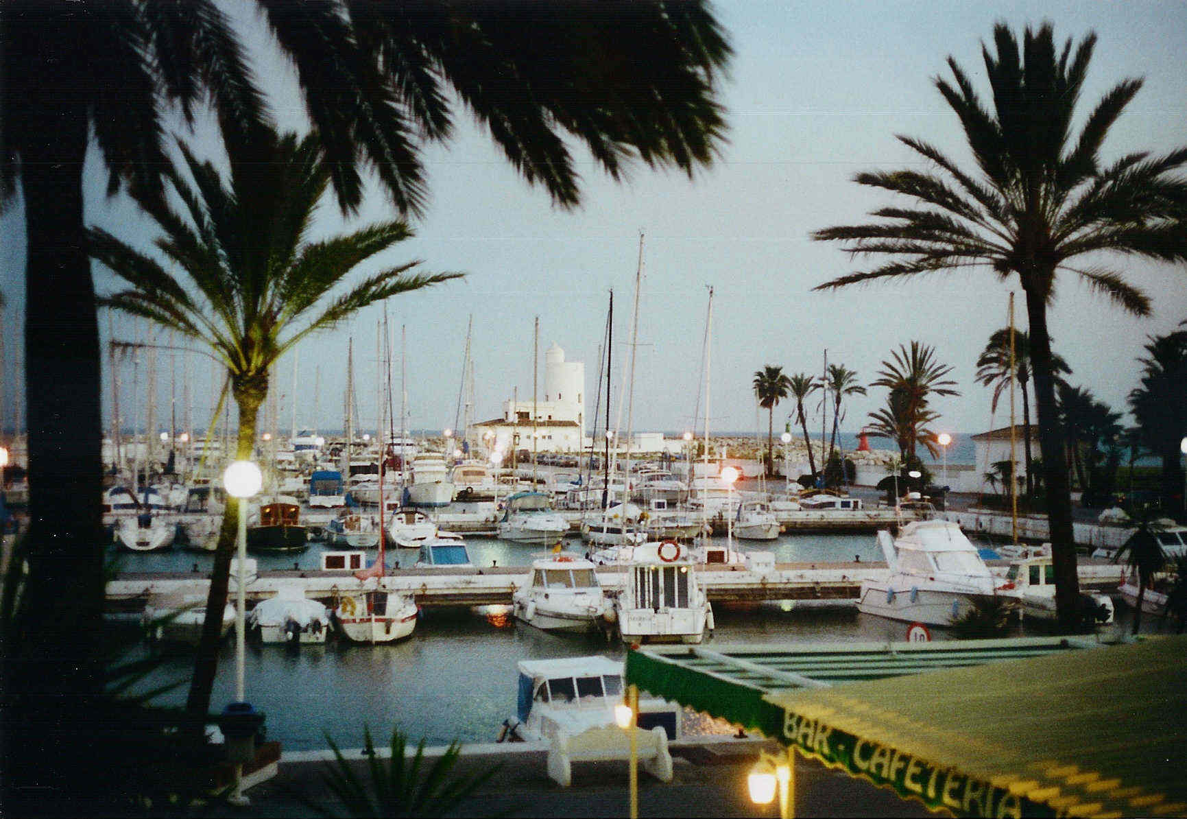 Hafen in Puerto de la Duquesa